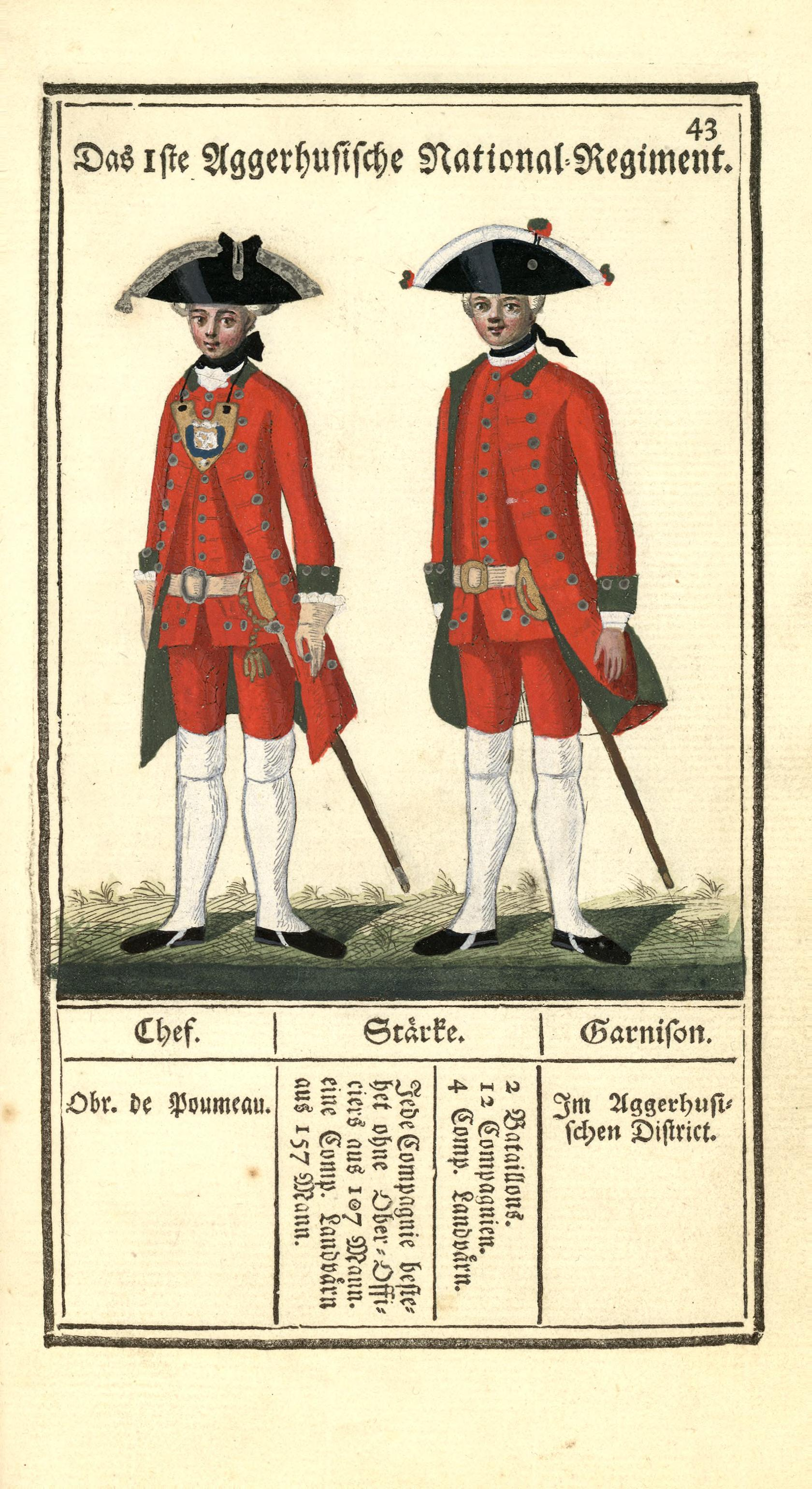 Illustrasjon hentet fra boken "Vorstellung der sämtlichen Königl. Dänischen Armee" av Bertram, Carl og utgitt av Carl Bertram (dk, 1763)